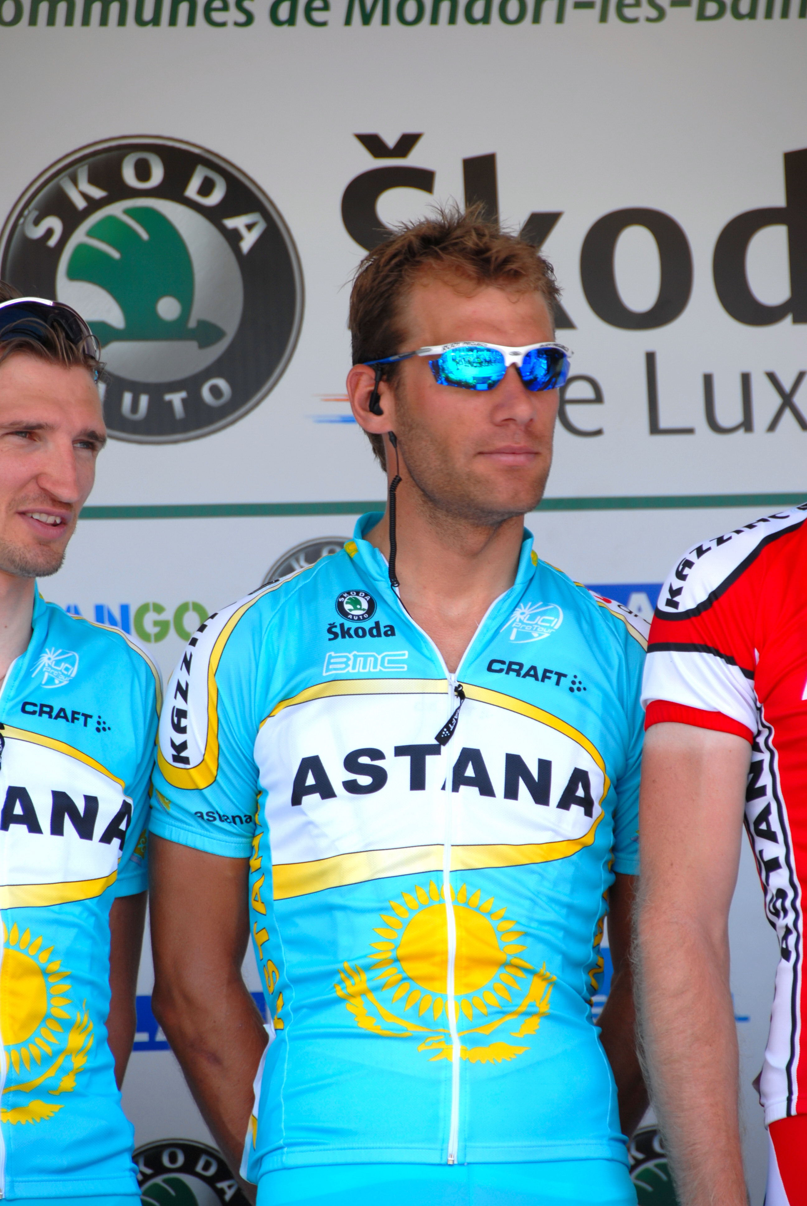 Sujet : De Benoît Joachim bei der Equippeprésenatioun vum Skoda Tour de Luxembourg 2007 (7. Juni 2007).